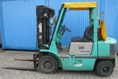 Mitsubishi FG 25 Gasstapler, Frontstapler, Baujahr: 1996, dreifaches Hubgerüst, Hubhöhe: 4300 mm, Gabellänge: 1200 mm, Tragfähigkeit: 2500 kg, Bauhöhe: 2050 mm, Arbeitsscheinwerfer vorn, Dachabdeckung, Frontscheibe, Vollfreihub